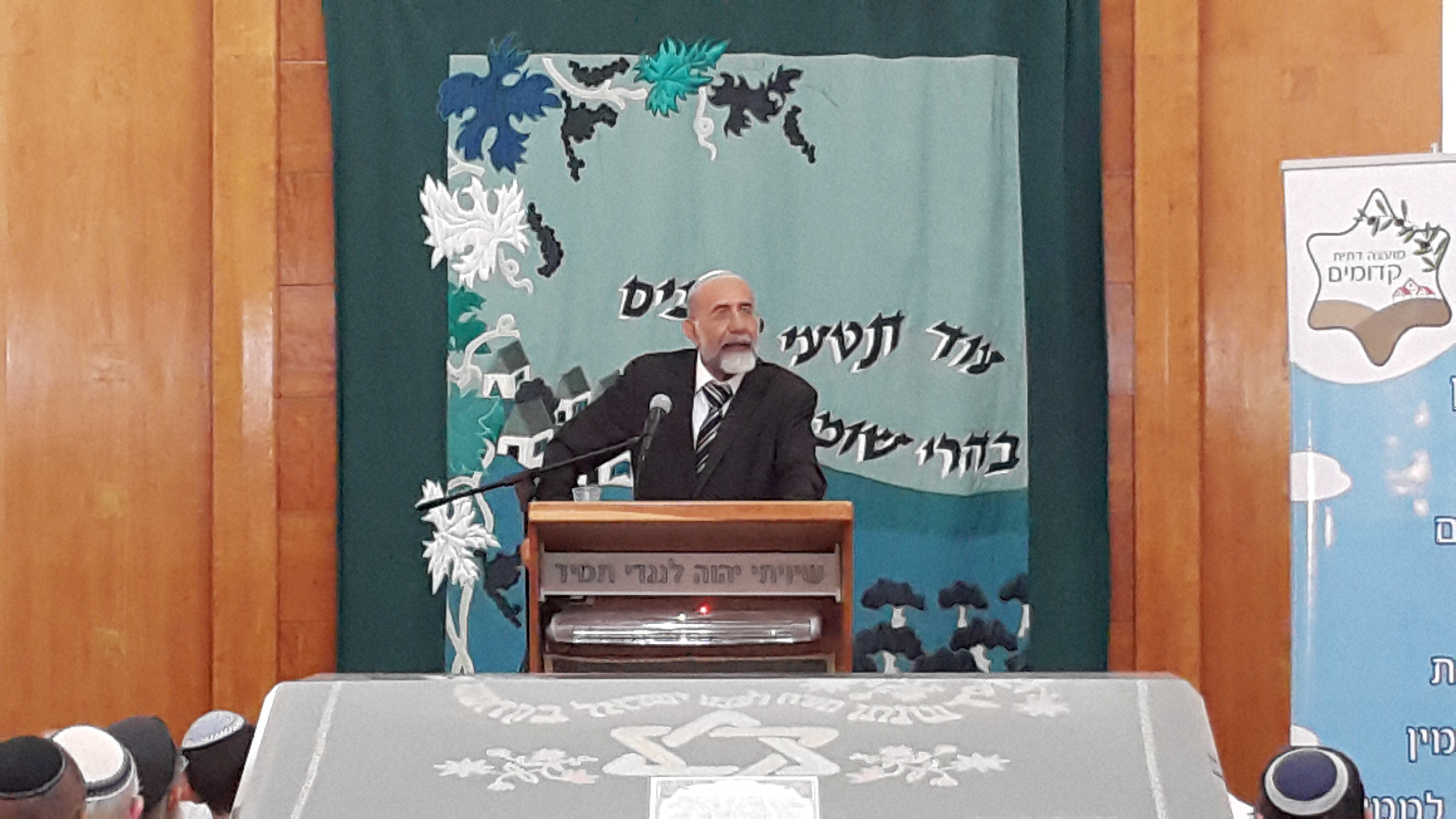 הרב יעקב צ'יקוטאי